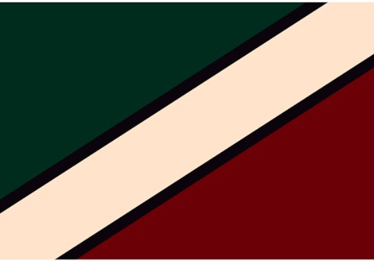 Bandera UTS